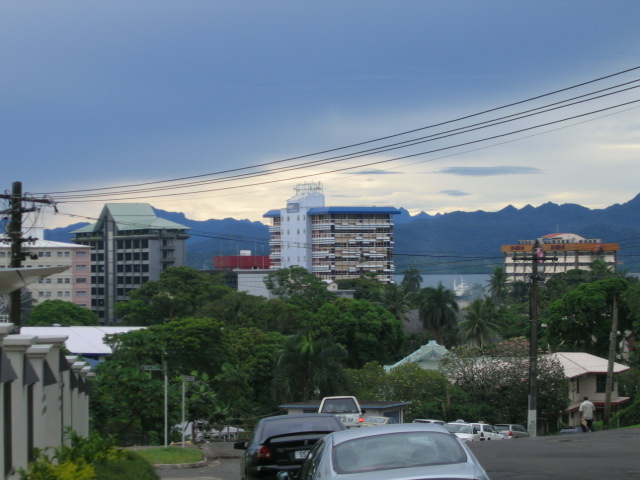 Suva